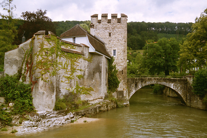 Schloss Zwingen, westliche Vorburg mit Torturm und Bering